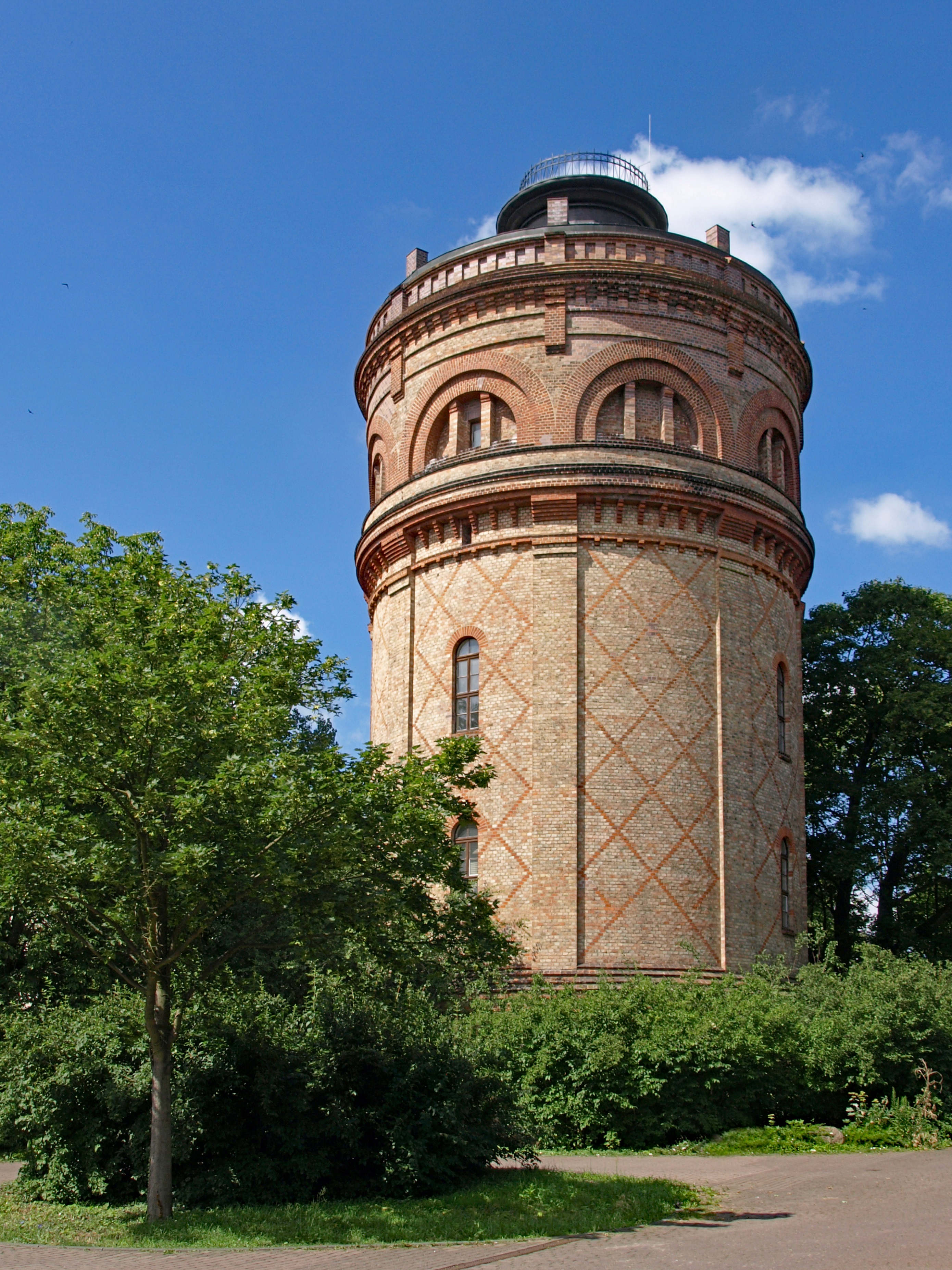 ehem. Wasserturm und heutiges Planetarium in Frankfurt (Oder)